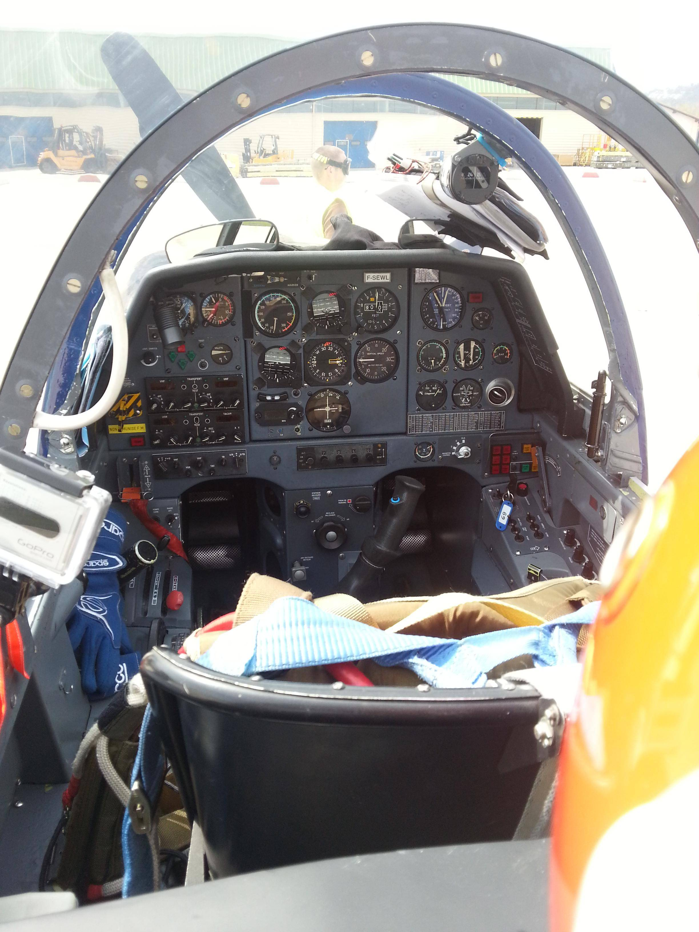 Vue du poste pilot du Socata TB30 Epsilon